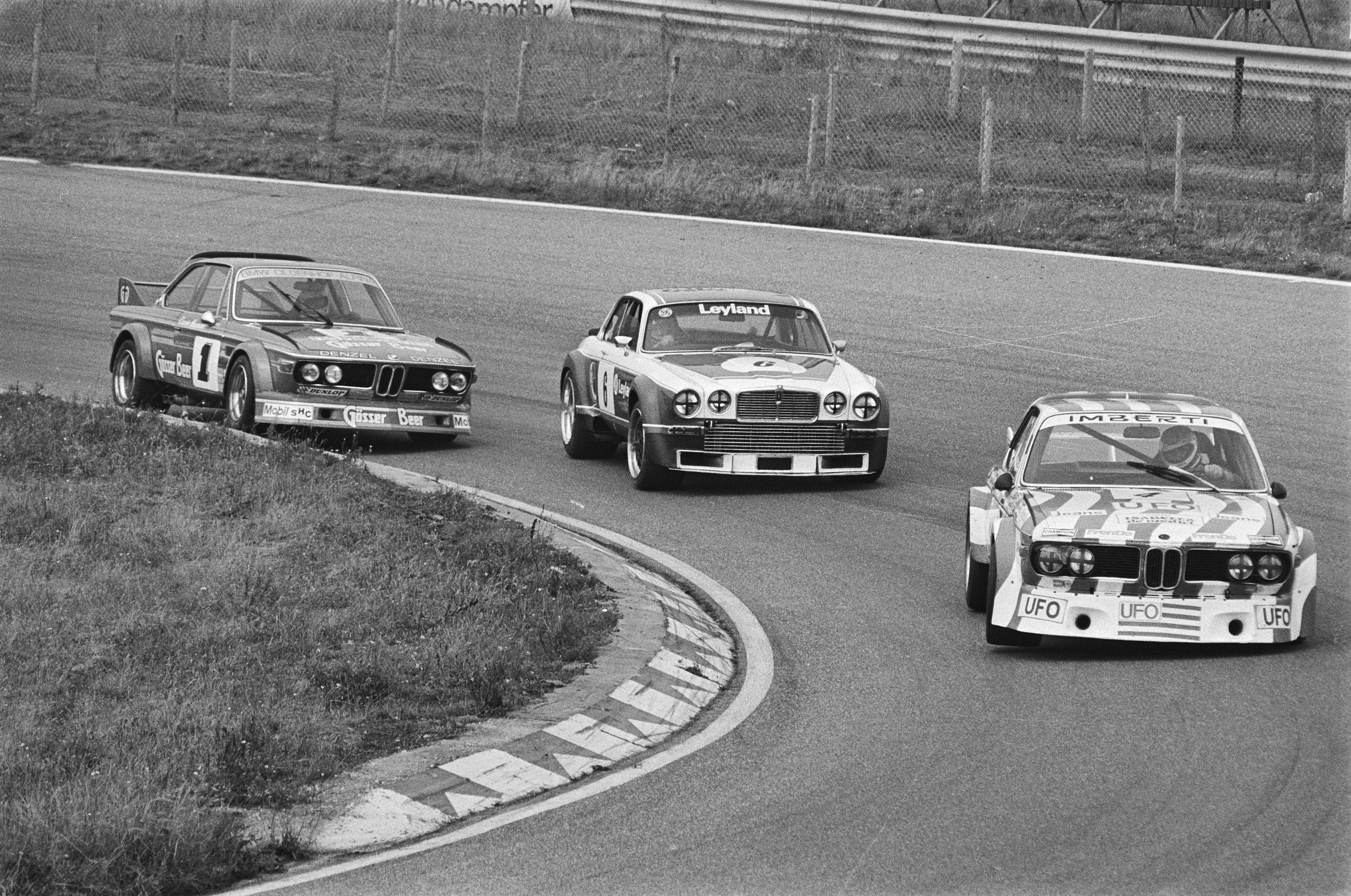 Collectie / Archief : Fotocollectie Anefo Reportage / Serie : [ onbekend ] Beschrijving : 4 uursraces Zandvoort Trophy, v.l.n.r. Henemans met BMW, Bell met Jaguar en Facetti met BMW Datum : 7 augustus 1977 Locatie : Noord-Holland, Zandvoort Trefwoorden : autoraces Persoonsnaam : BELL Fotograaf : Peters, Hans / Anefo Auteursrechthebbende : Nationaal Archief Materiaalsoort : Negatief (zwart/wit) Nummer archiefinventaris : bekijk toegang 2.24.01.05 Bestanddeelnummer : 929-2975